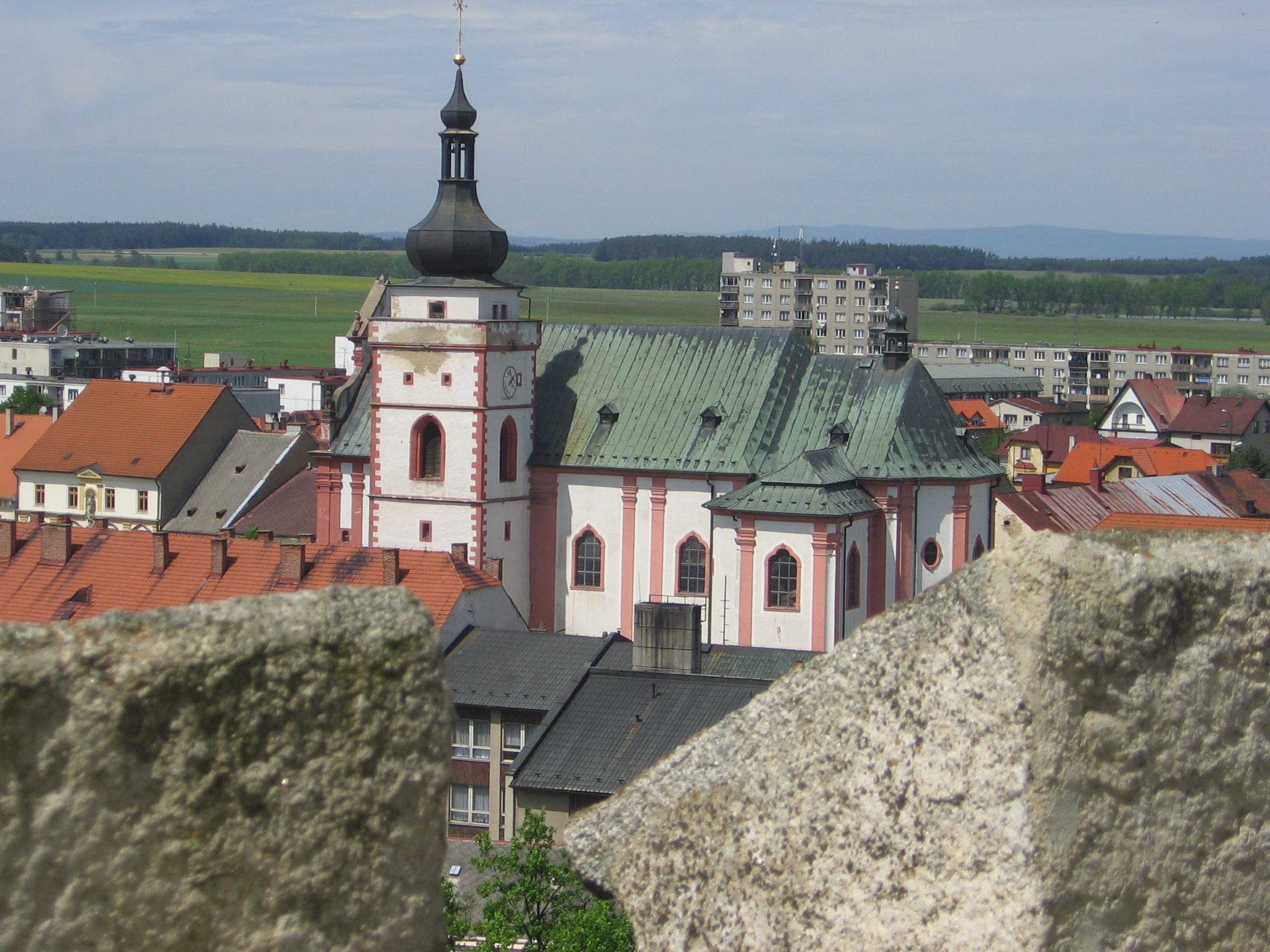 Pohled ze zámecké věže na kostel sv. Mikuláše na nám. Republiky, Bor, okr.Tachov